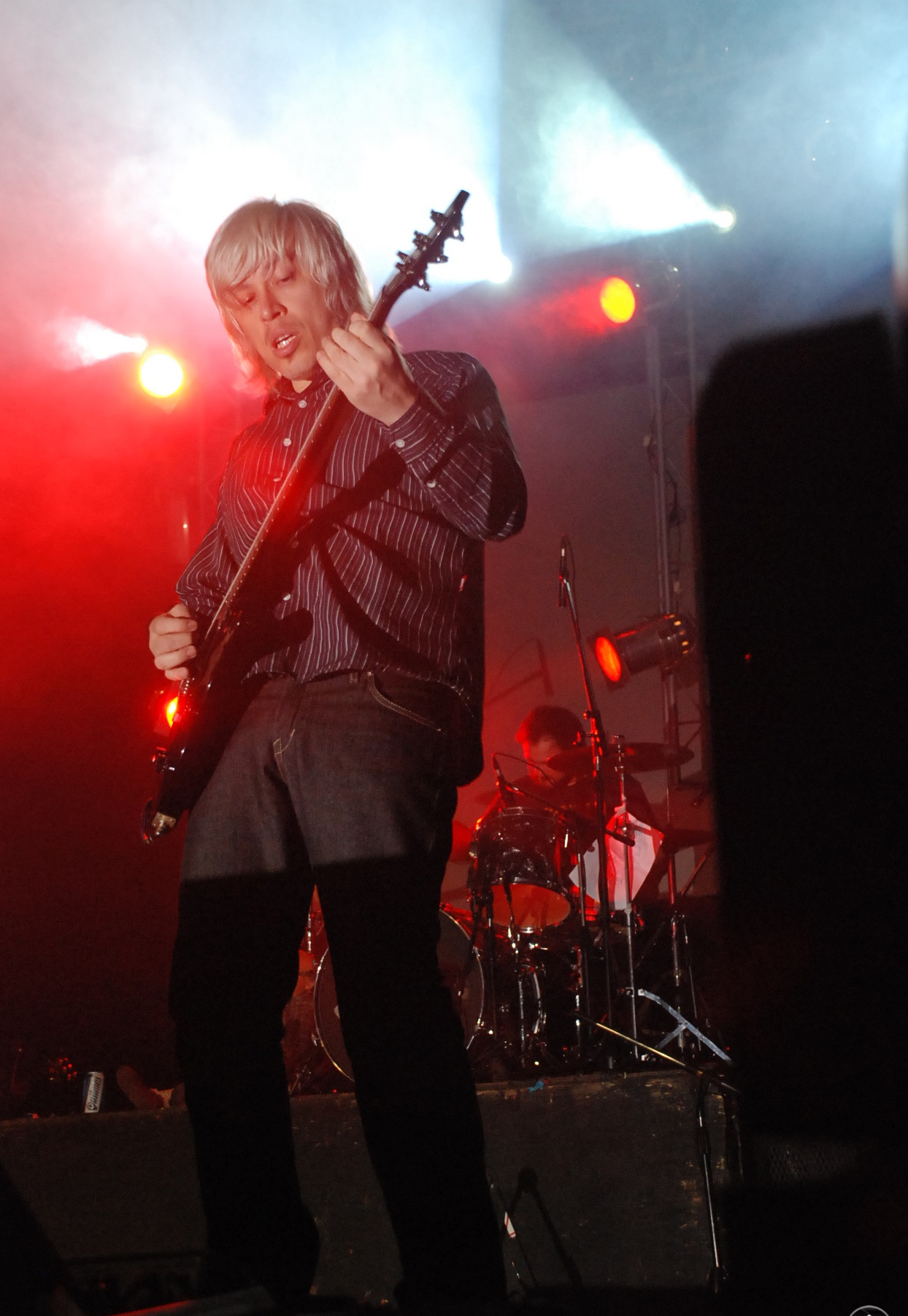 Pablo Mondello en 2007.